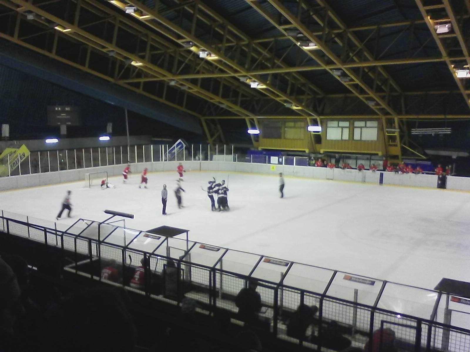 Српски (ћирилица): Хокејаши Партизана постижу гол против Звезде